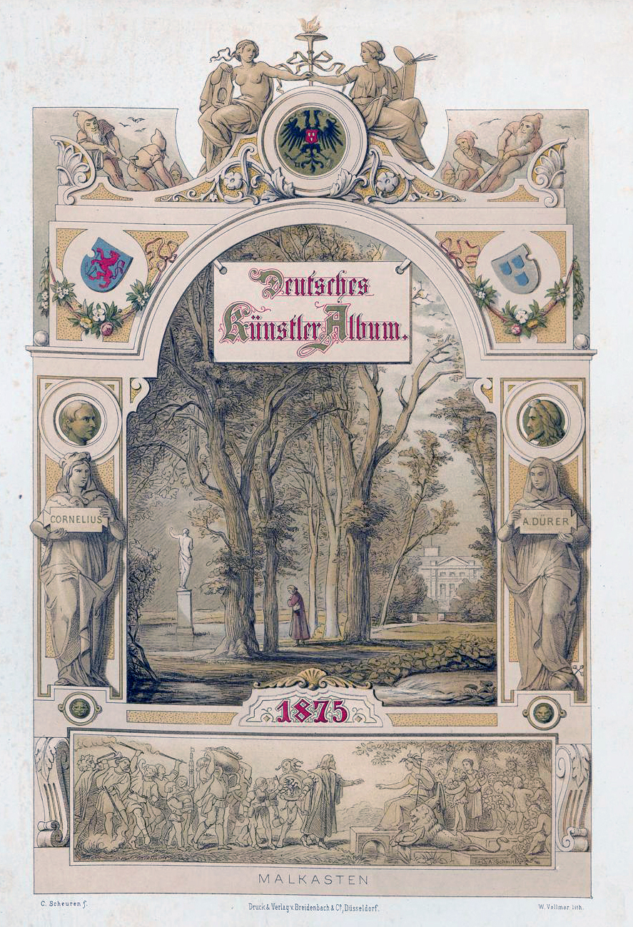 Illustration von Caspar Scheuren, Titelbild im Künstler-Album, 1875